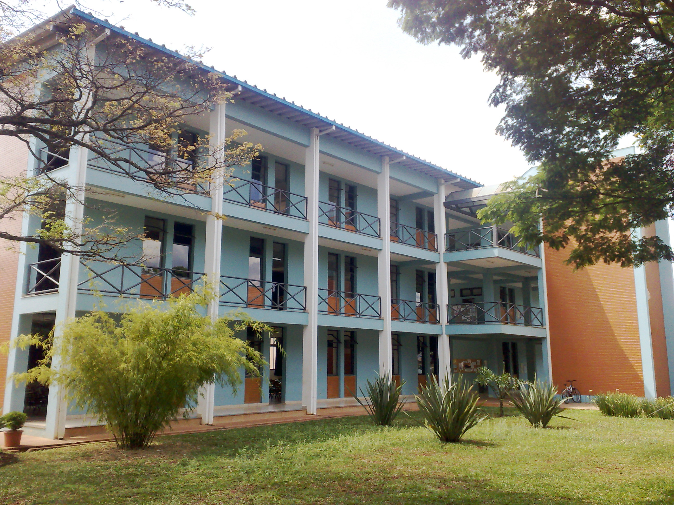 Universidade Federal de Lavras (Pavilhão de Aulas III)